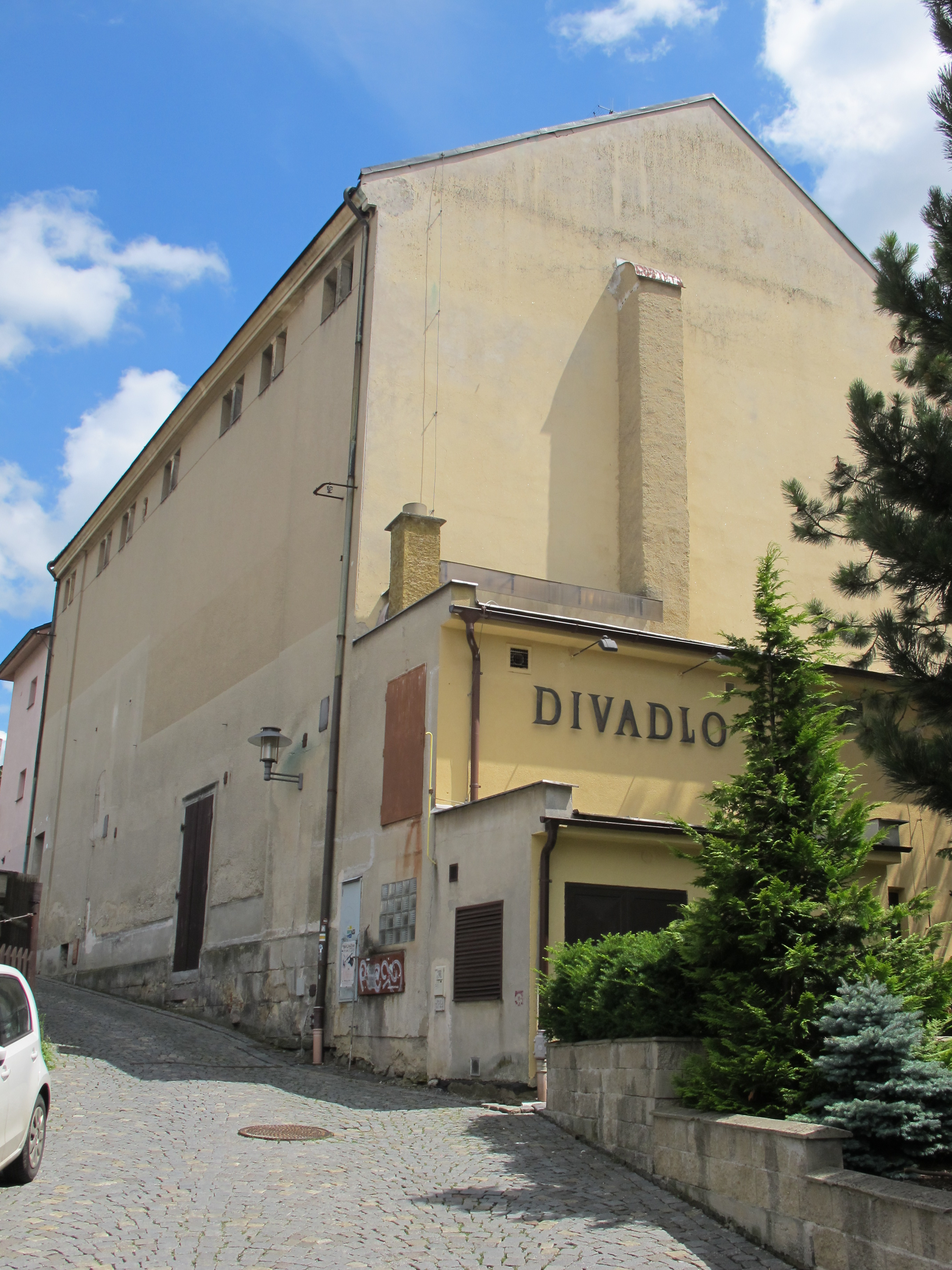 Divadlo v Turnově, Ladislava Petrnouška 670, Turnov.